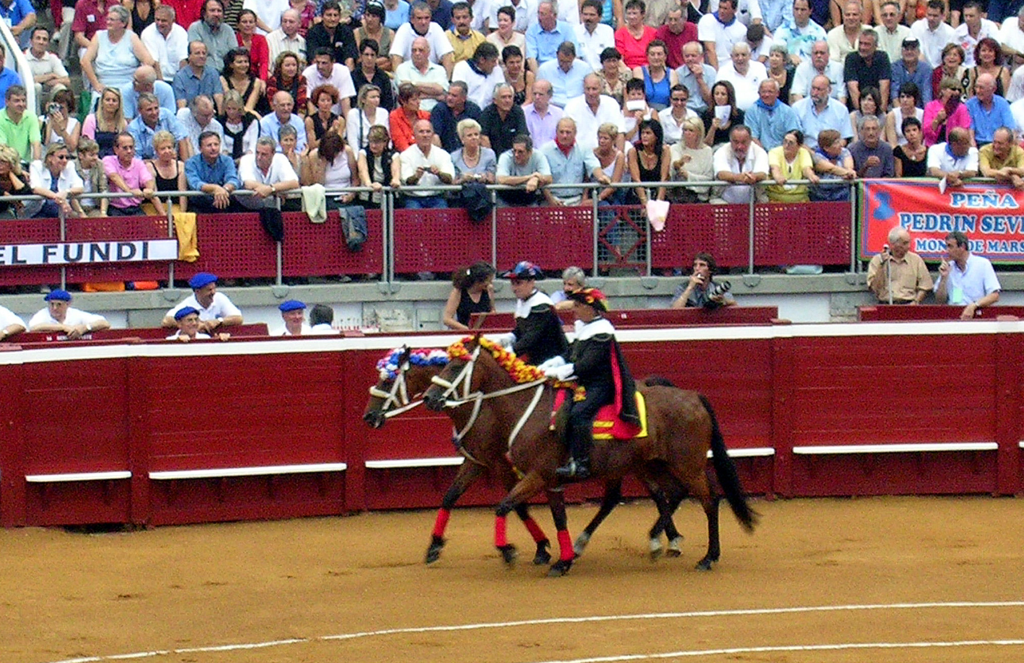 Paseo corrida à Mont-de-Marsan pendant les fêtes de la Madeleine. Passage des alguazils. Photo prise par Jibi44 en juillet 2004.